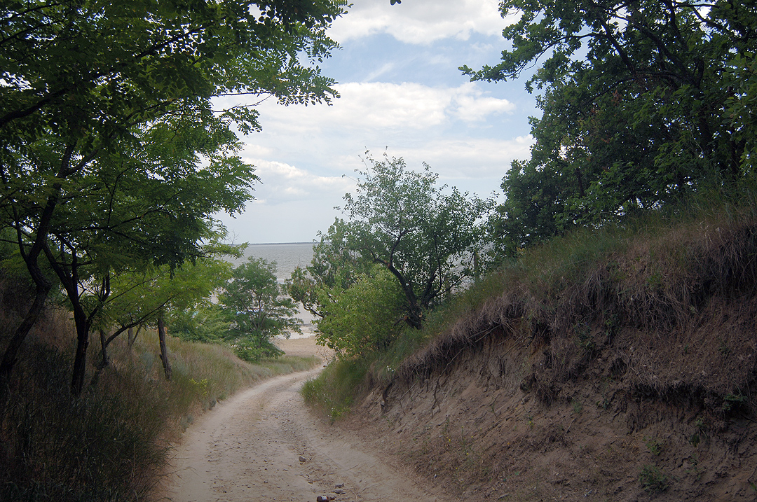 Дорога к Молочному лиману в Алтагирском лесничестве. У села Богатырь Акимовского района Запорожской области